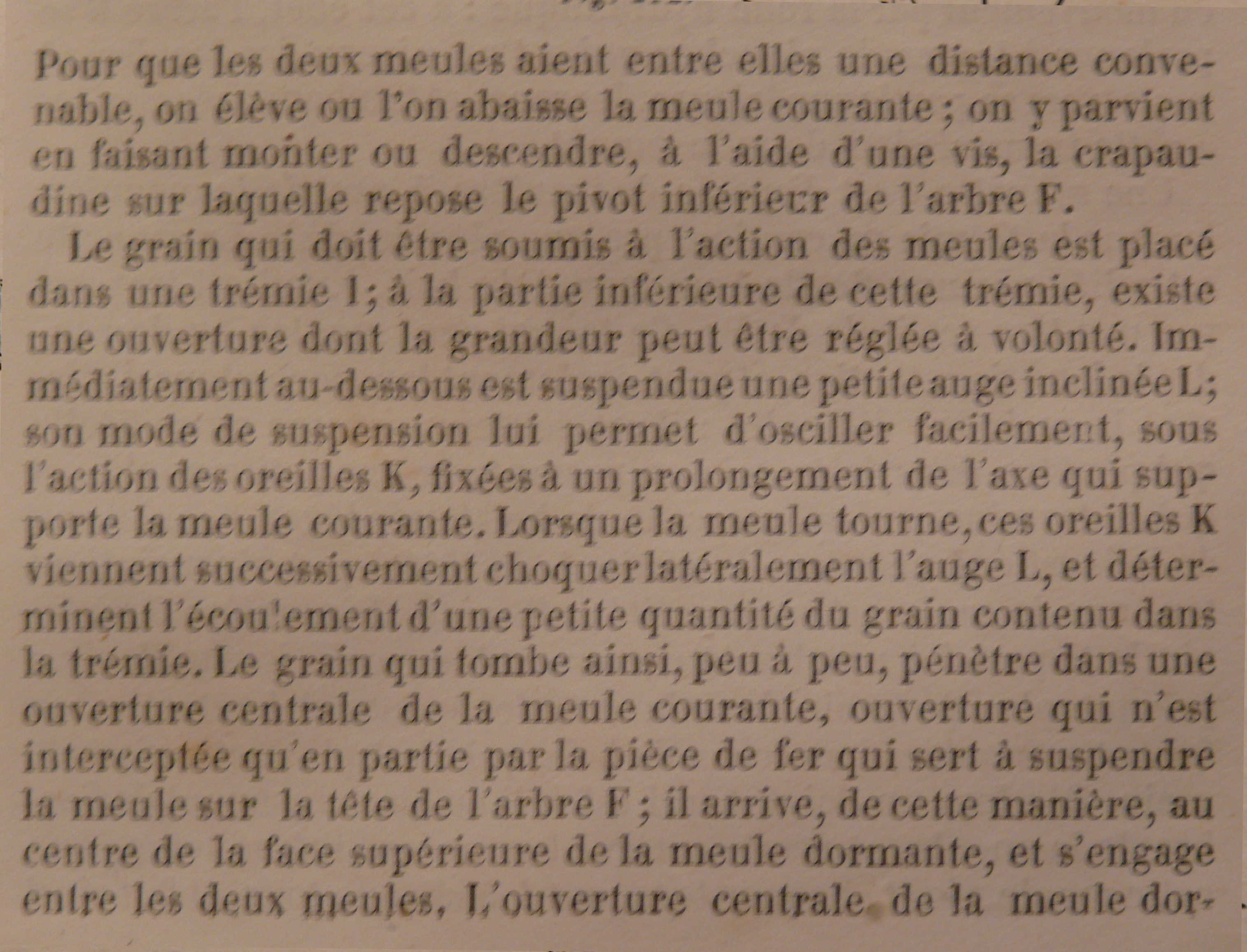 légende de la gravure"alimentation des meules"